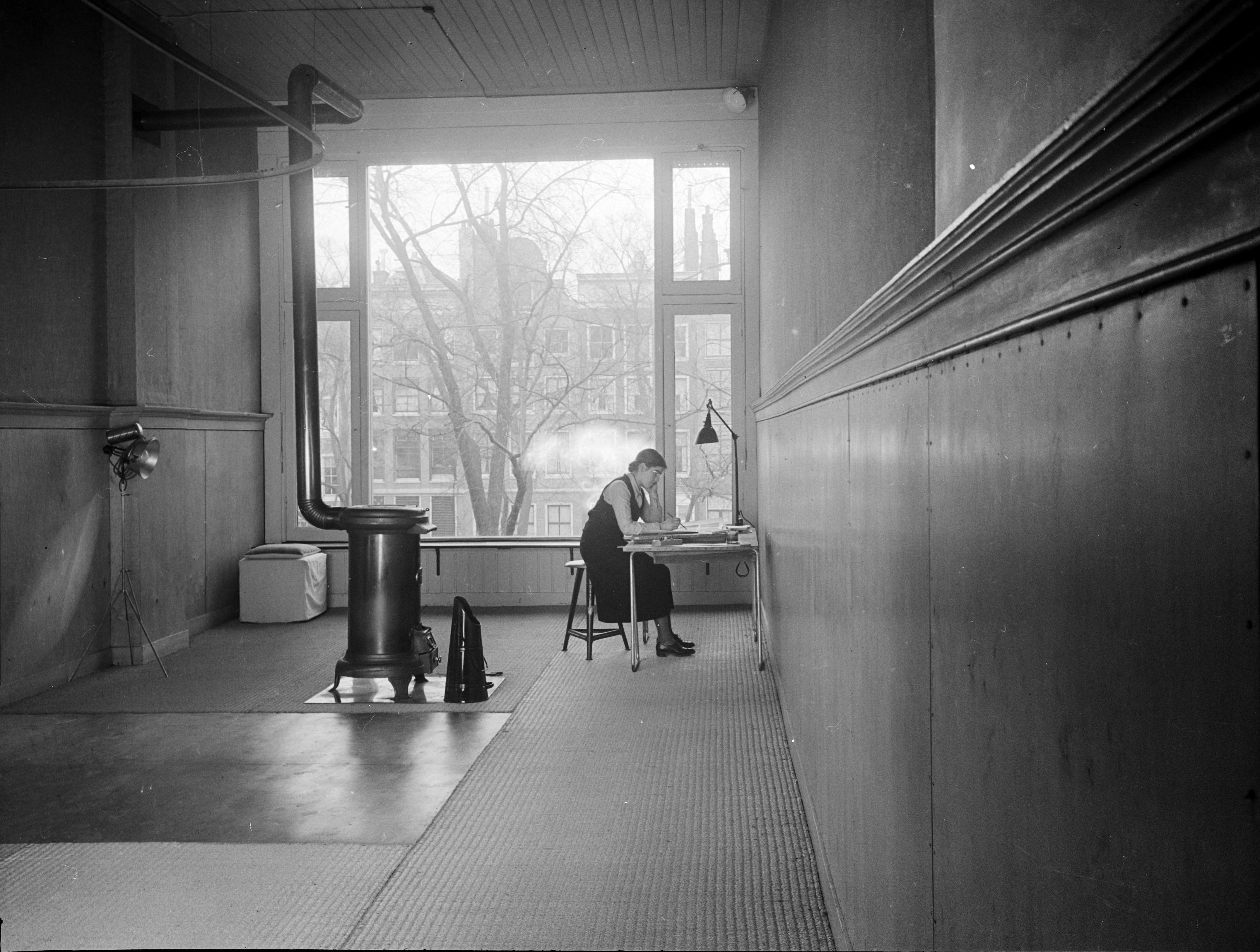 Keizersgracht 498 Het interieur van het atelier van Co-op 2, het reclamebureau van fotograaf Guermonprez. Aan tafel: Trude Jalowetz.